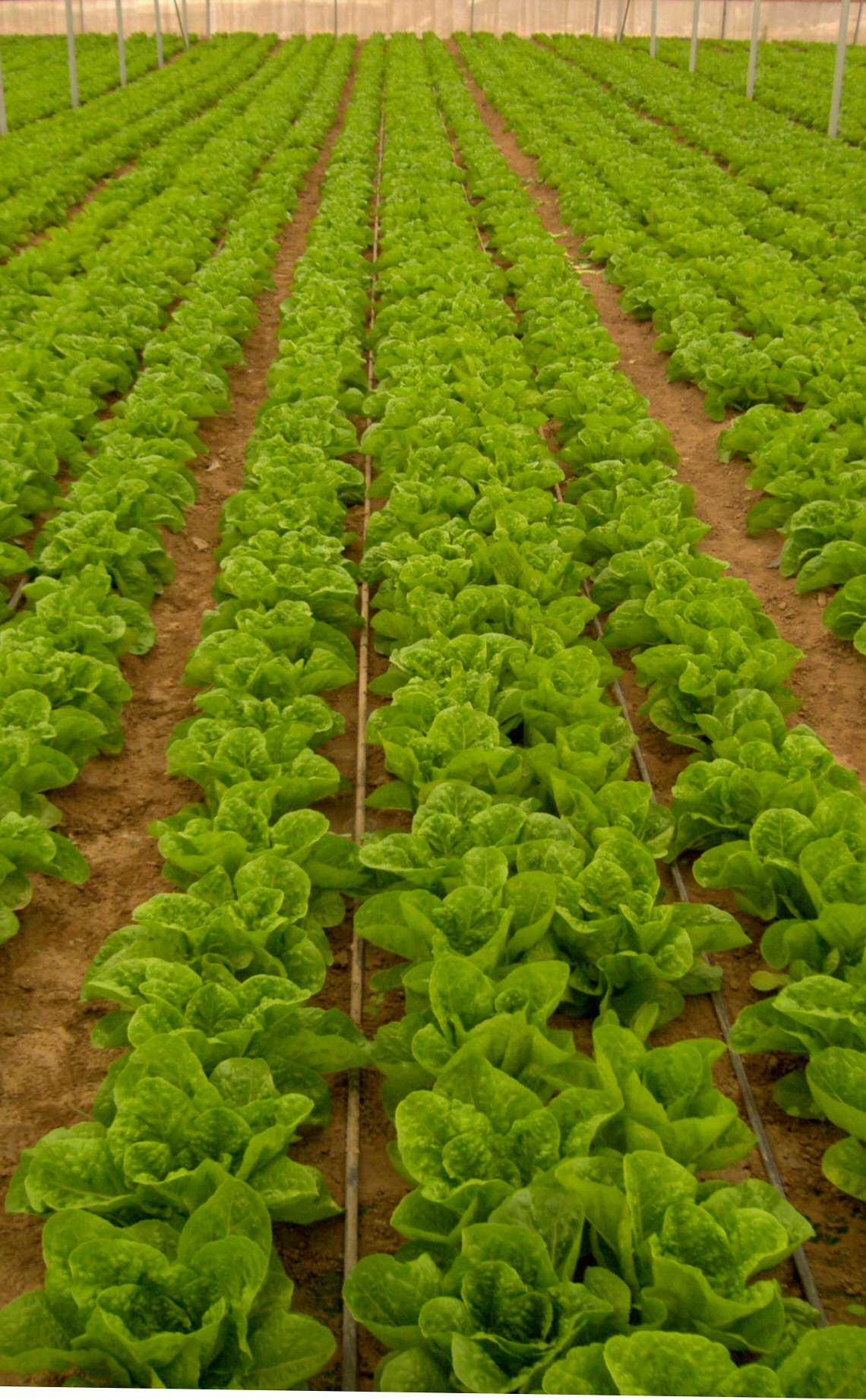 Lactuca sativa gush katif